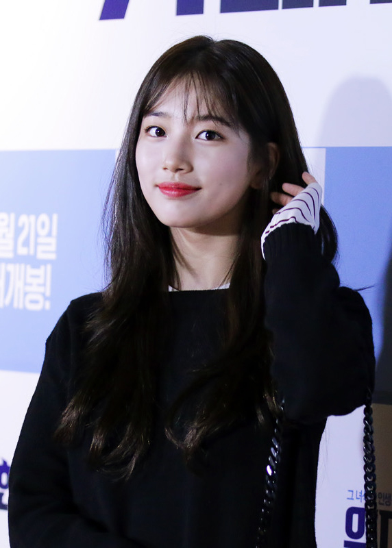 2016년 4월 14일 위대한소원 시사회에서 수지